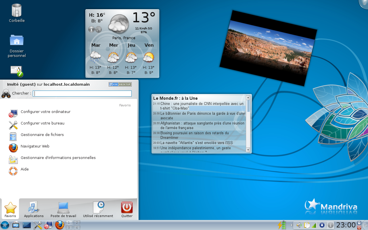 Image taken from Mandriva Wiki